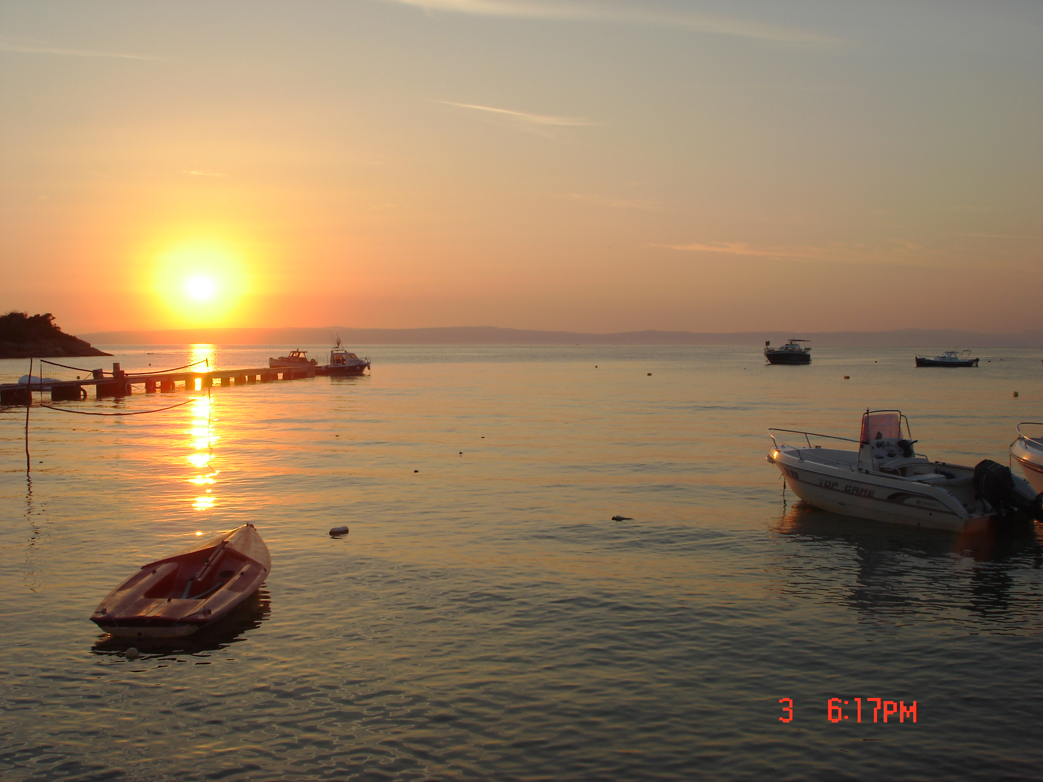 SUPETARSKA DRAGA – GONAR